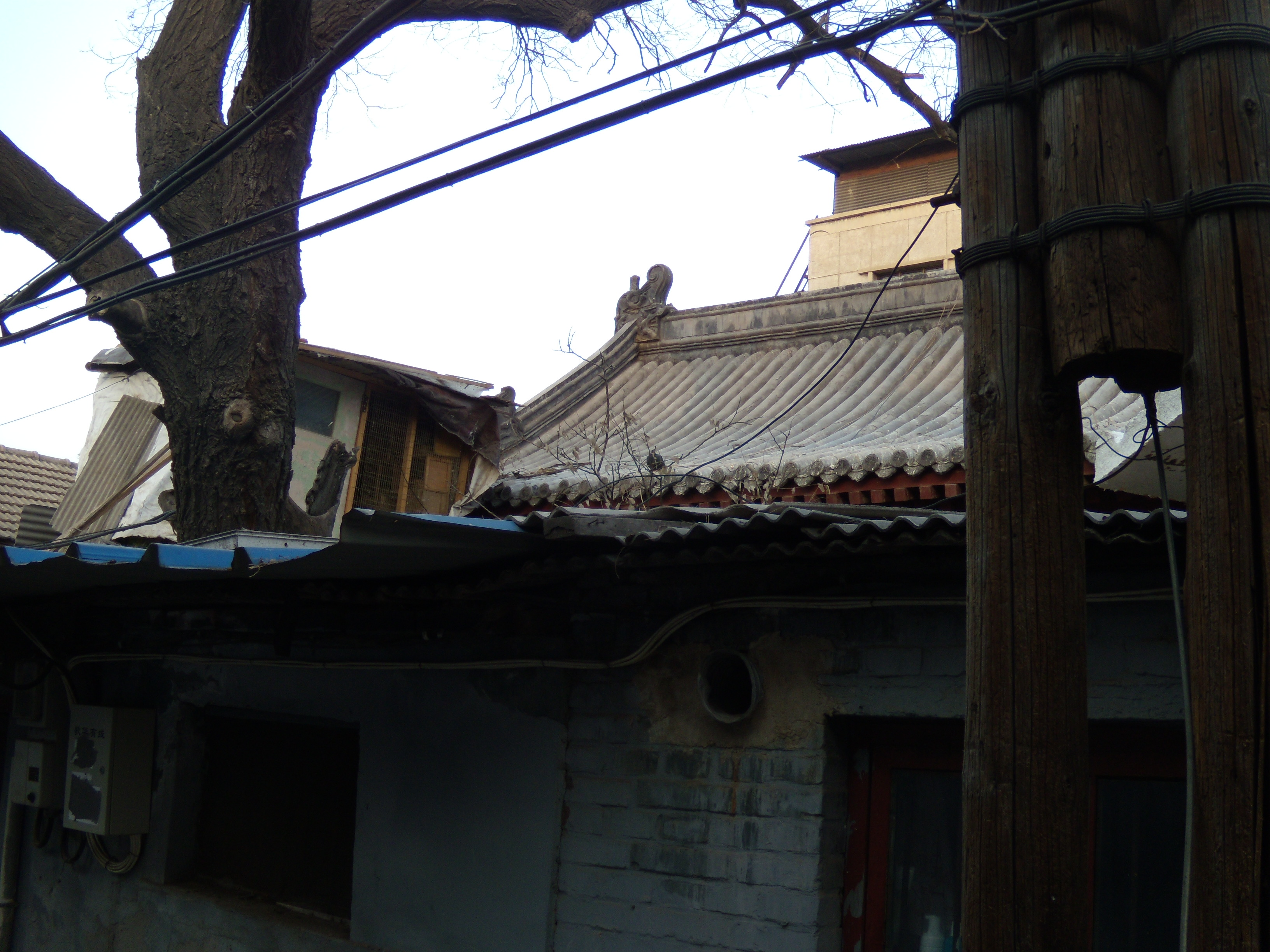 北京护国寺